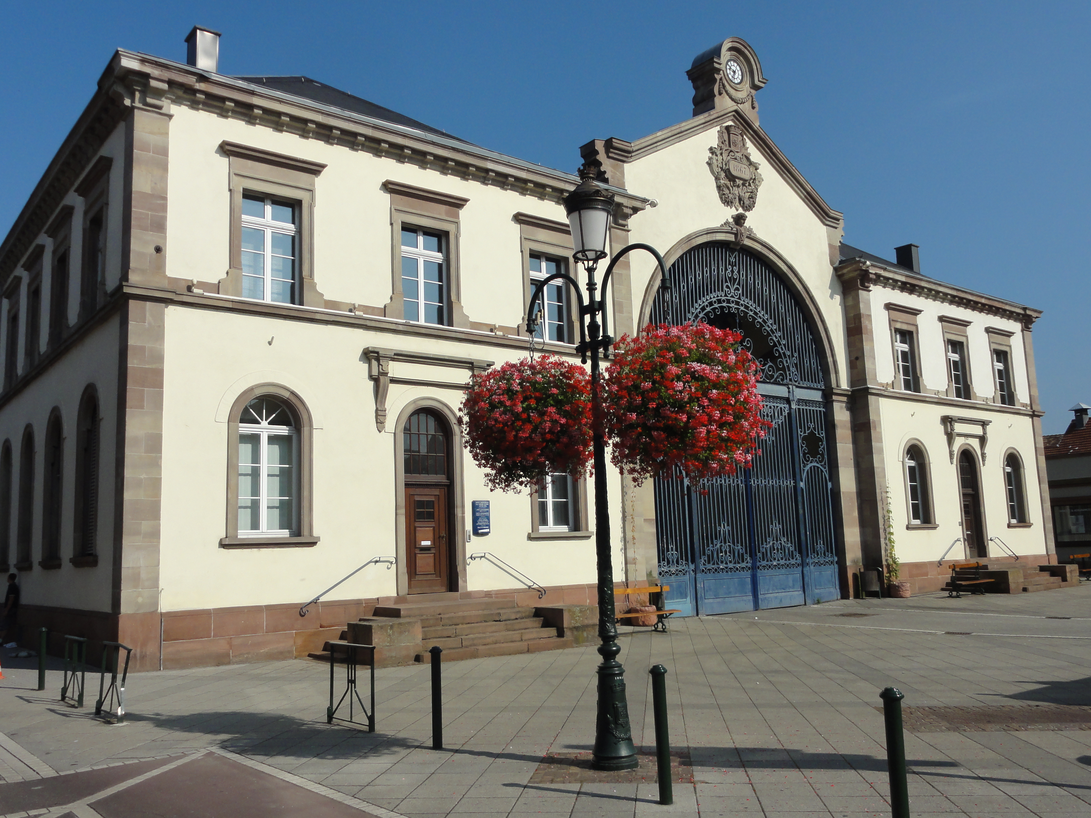 Alsace, Bas-Rhin, Haguenau, Halle aux Houblons (1867), 115 Grand'Rue (IA00062051).